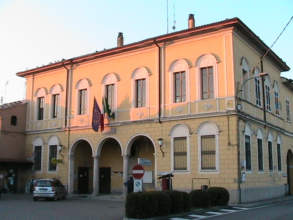 MOTTA BALUFFI - MUNICIPIO